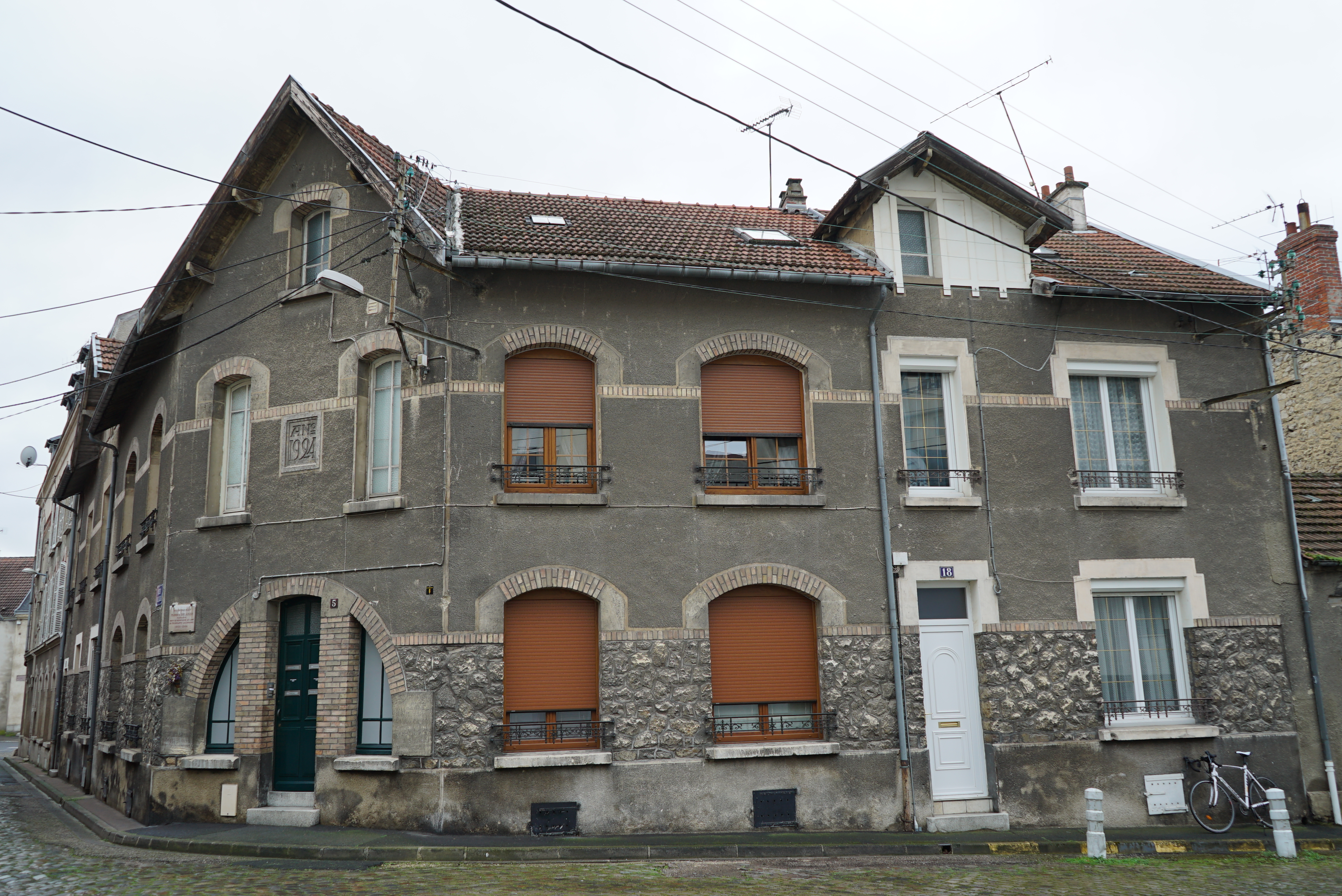 partie de la rue Coquillard